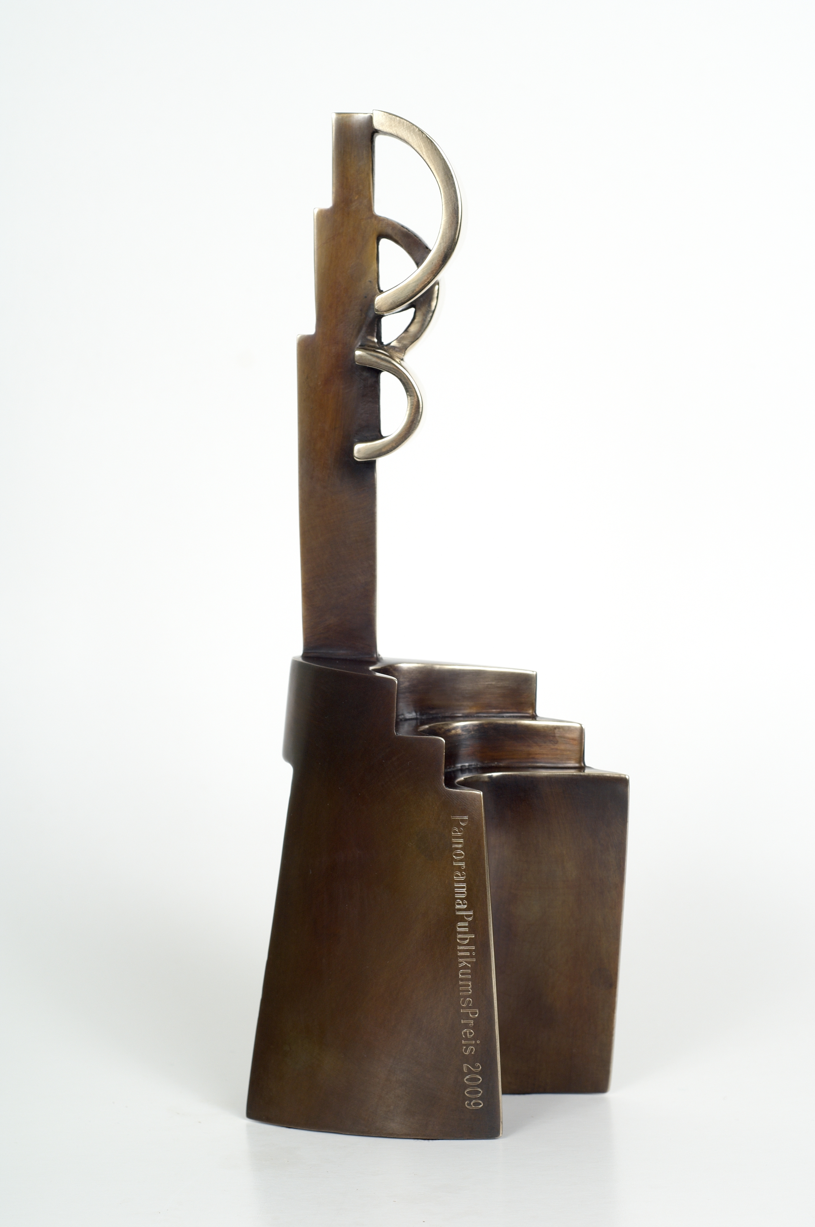 Seit 2009 besitzt der Panorama Publikumspreis ein neues Äußeres. Die Statue wurde von dem Künstler Christian Bilger entworfen.